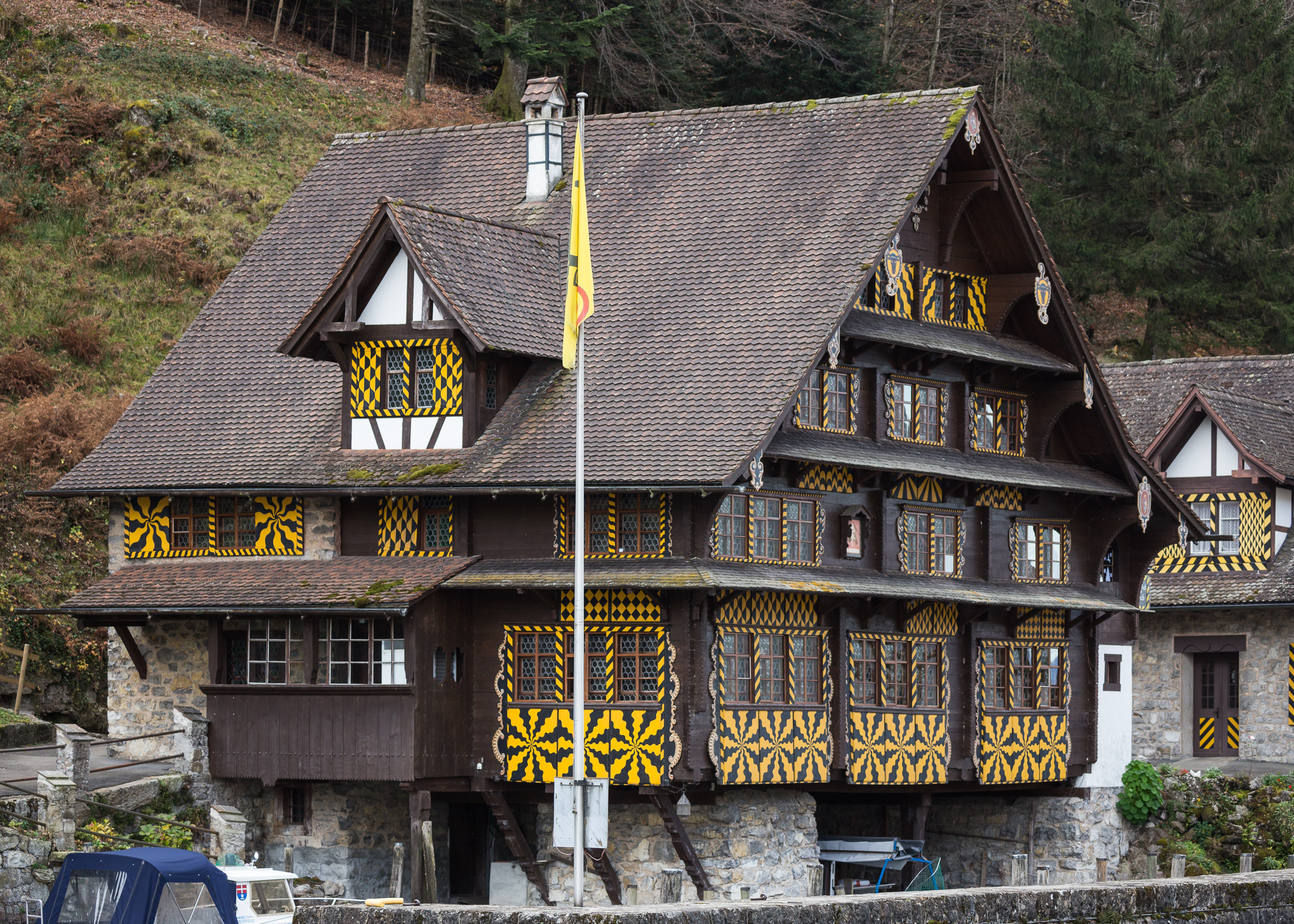 Wirtschaft zur Treib